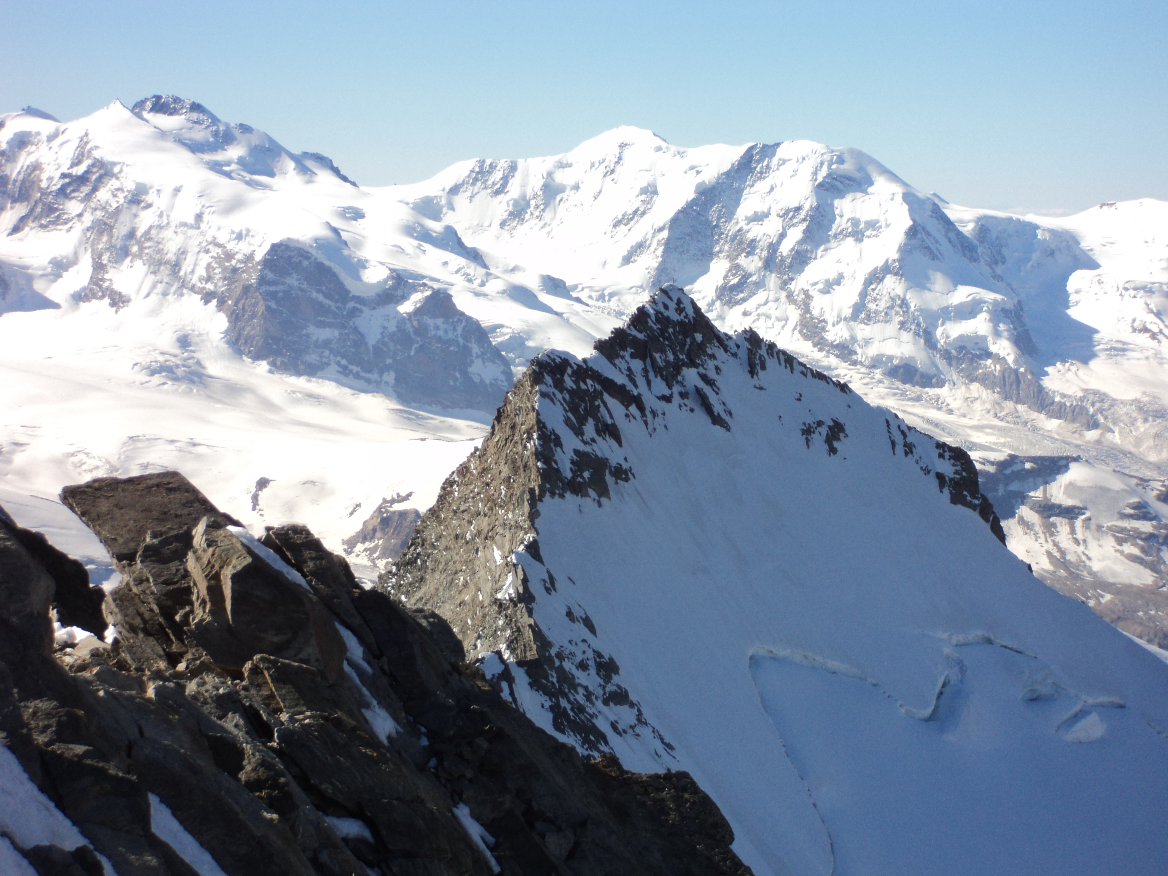 Il Täschhorn visto dalla vetta del Dom. Sullo sfondo il monte Rosa.